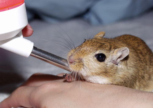 Meriones unguiculatus スナネズミの手給水写真。人に懐きやすいスナネズミの性質の良いサンプル 撮影者による写真のアップロード 撮影者名：Hidenori Inagaki 撮影年月日：2002年10月4日 ライセンス：GFDL及び、CC-BY-2.5